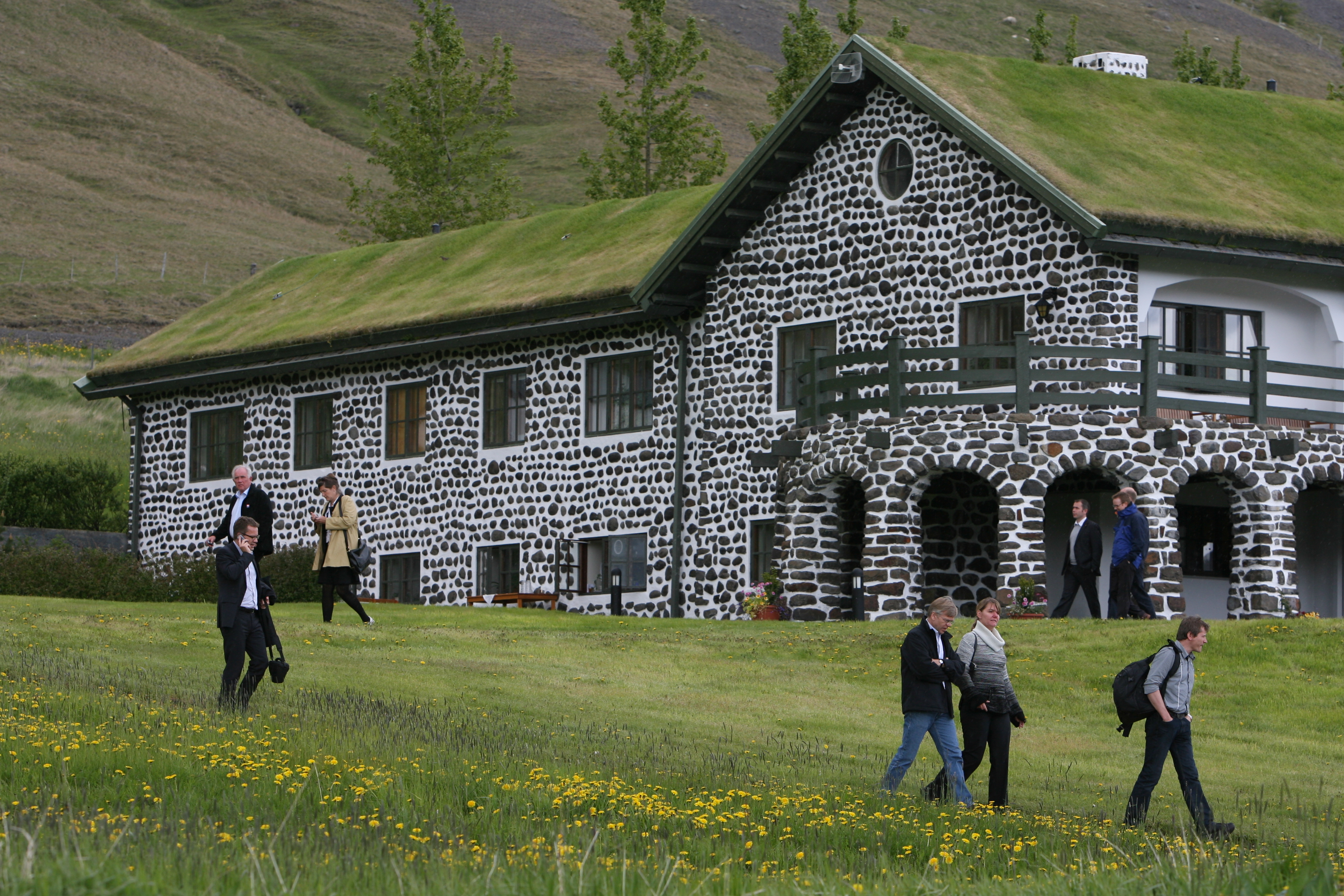 Gunnarshús á Skriðuklaustri